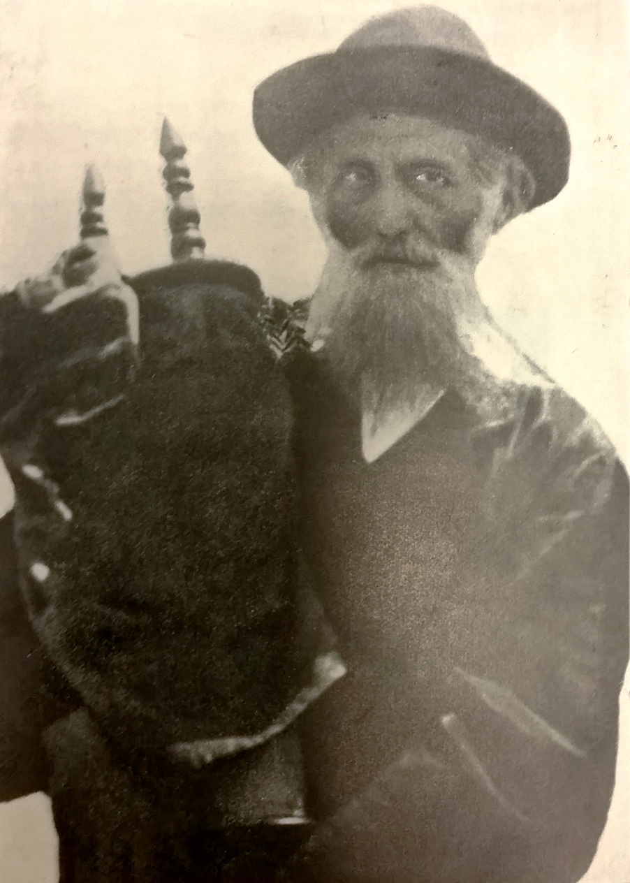 Shlomo Zalman Shach שלמה זלמן שך